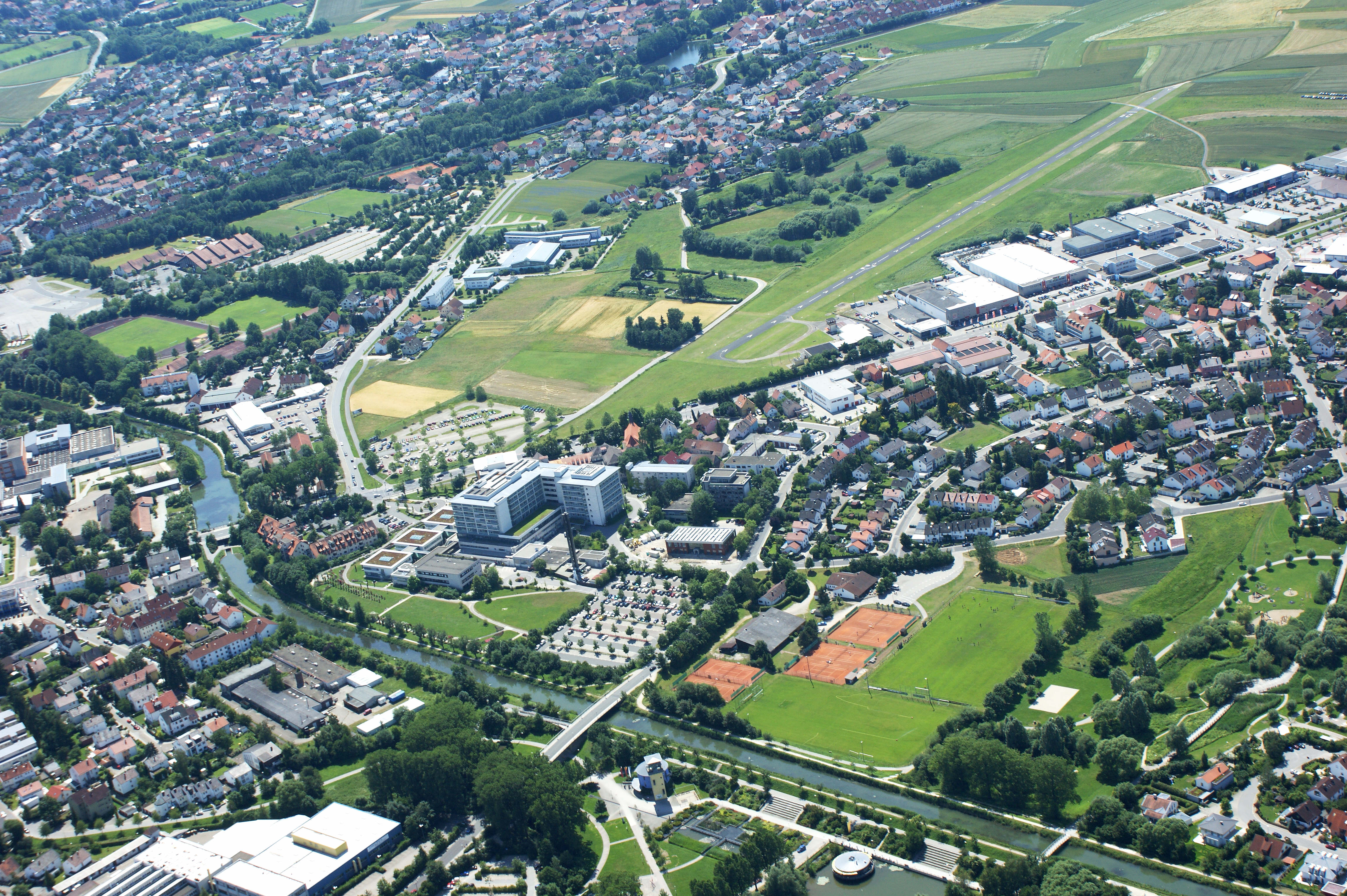 Flugplatz Neumarkt mit Klinikum